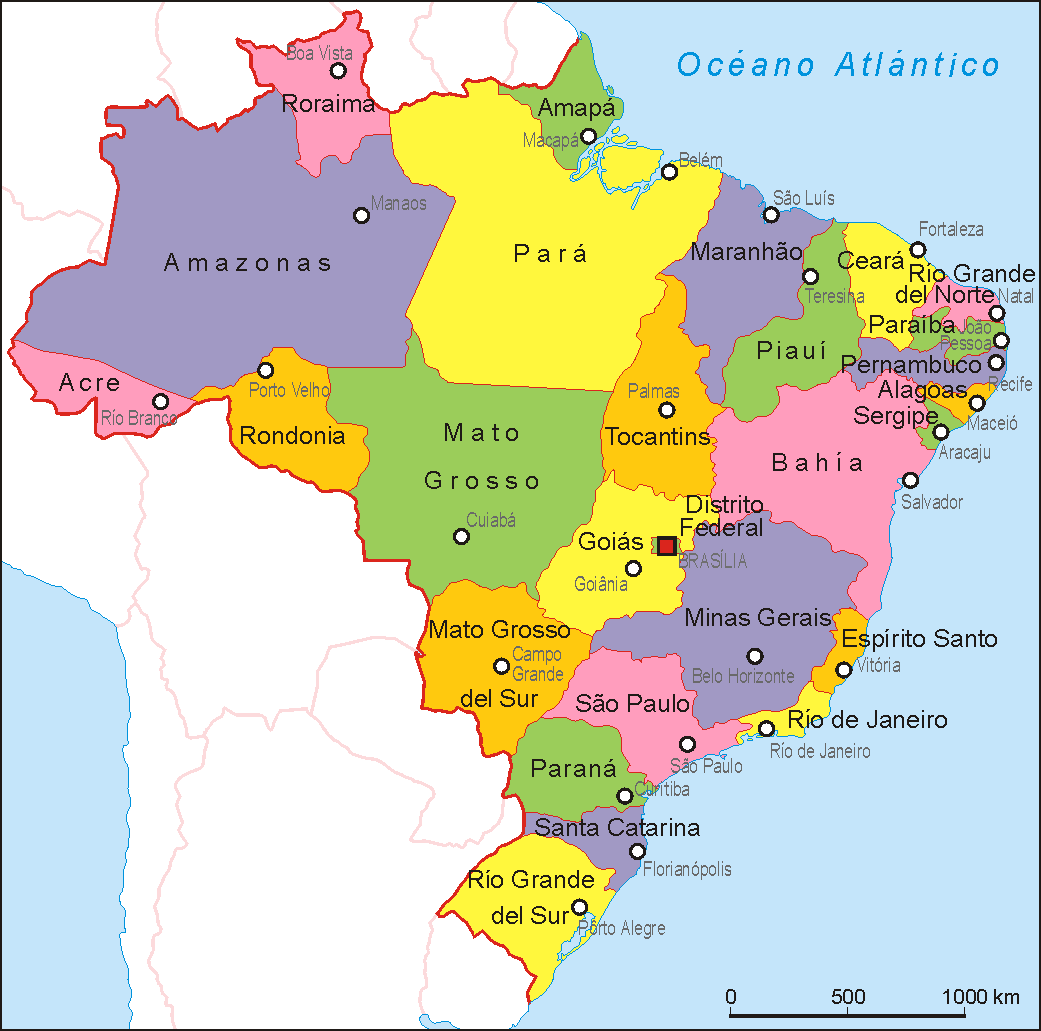 Mapa administrativo del Brasil.